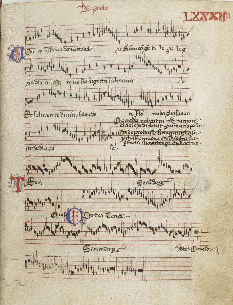 Paris, Bibliothèque Nationale, fonds italien 568